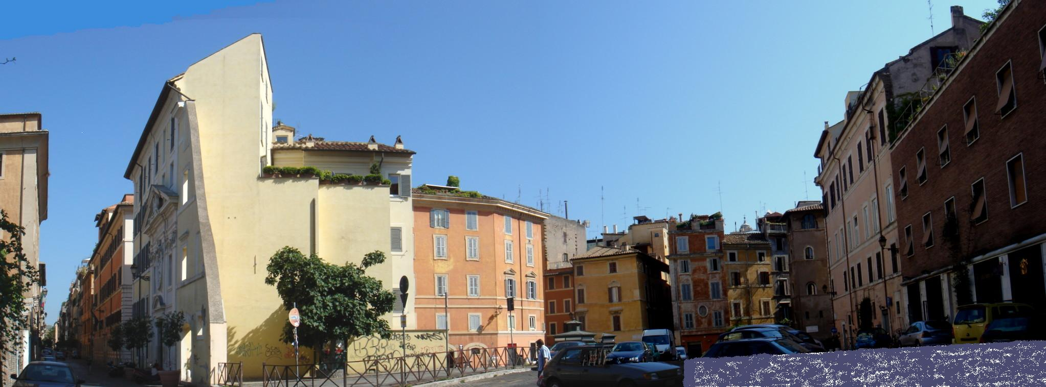 Roma , via Giulia e vicolo della Moretta